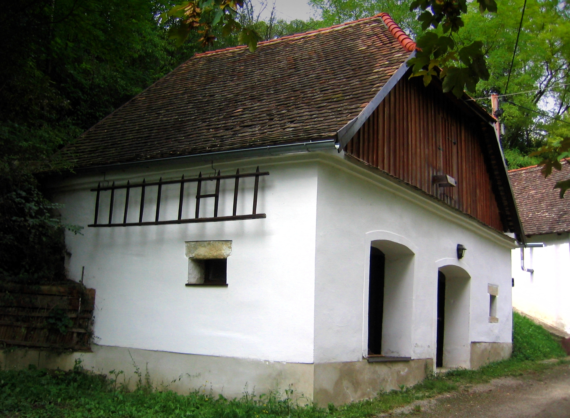 Mühlbergkellergasse Objekt 12